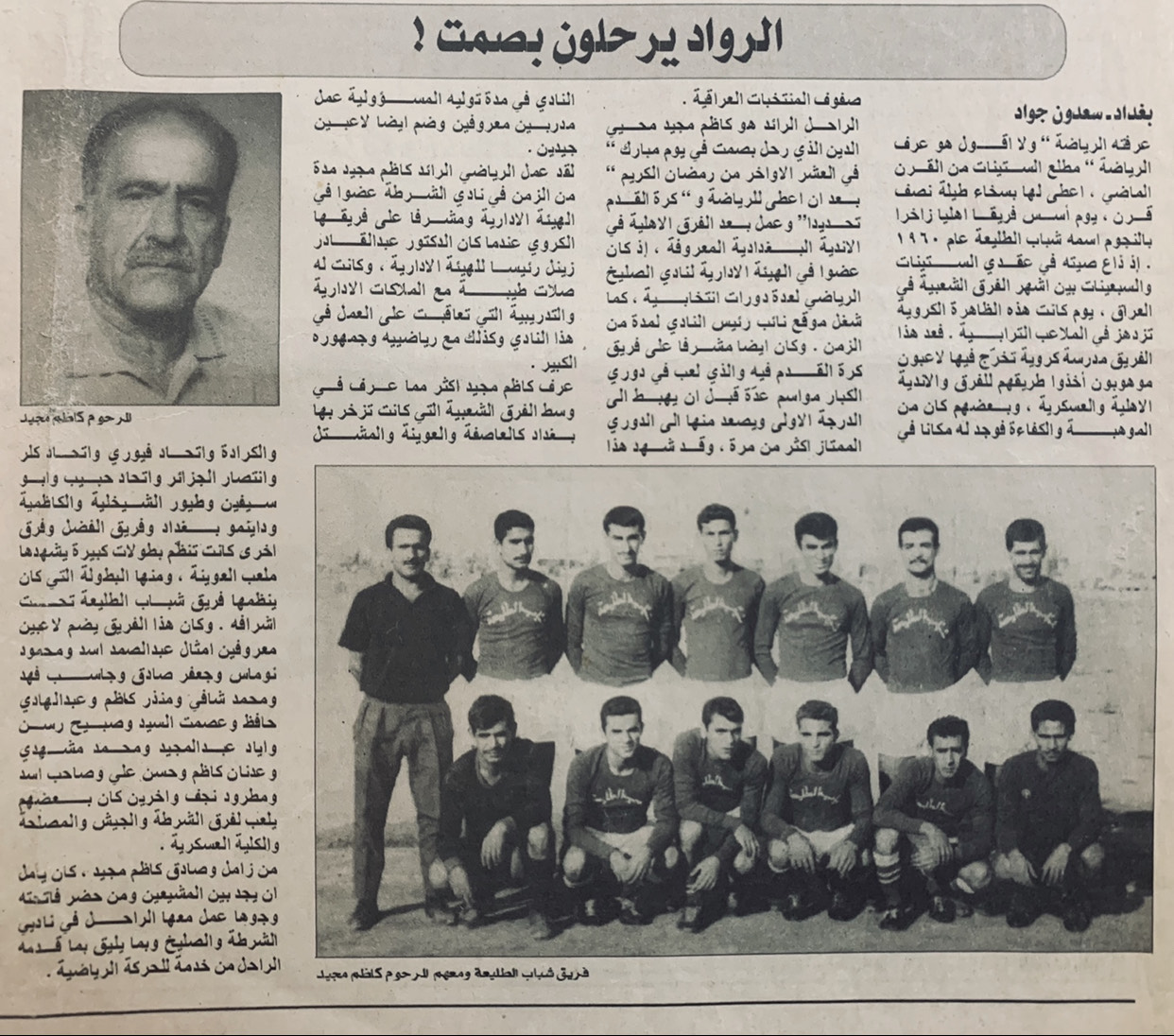 وفات كاظم مجيـد